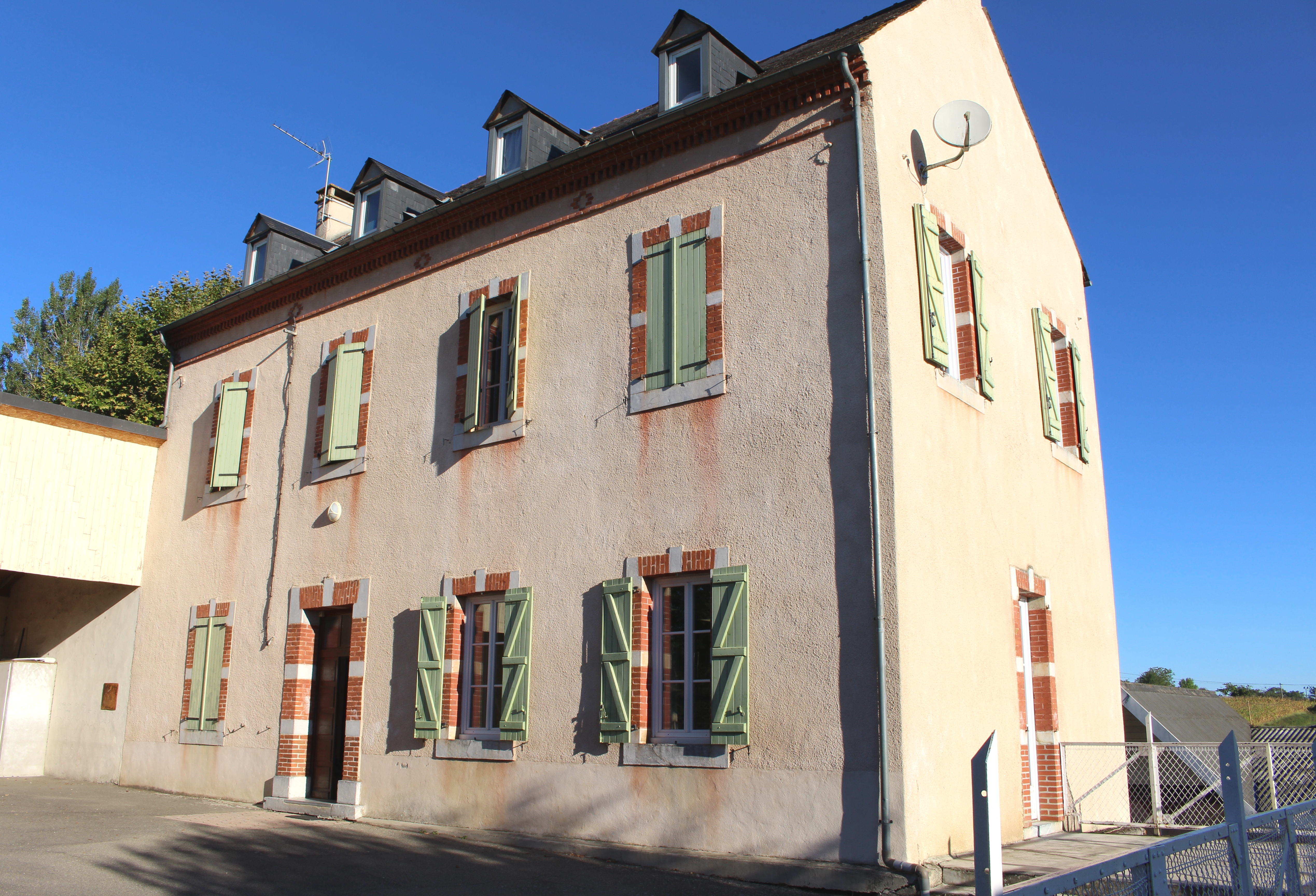 École de Laslades (Hautes-Pyrénées)